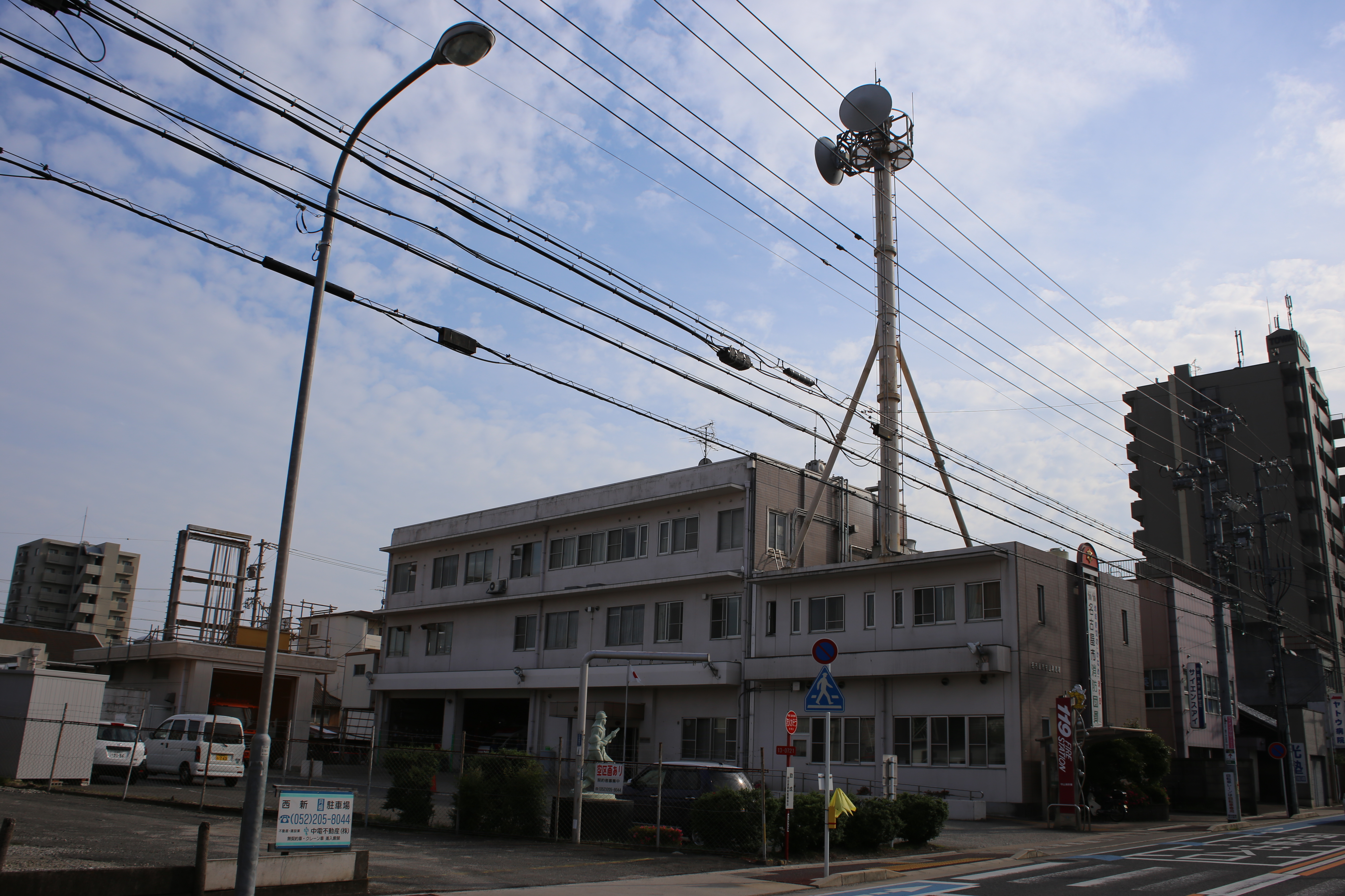 名古屋市守山区西新の名古屋市消防局守山消防署を北側公道東側より撮影